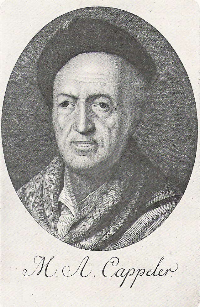 Portrait von Moritz Anton Kappeler (1685-1769). Stich 19. Jahrhundert